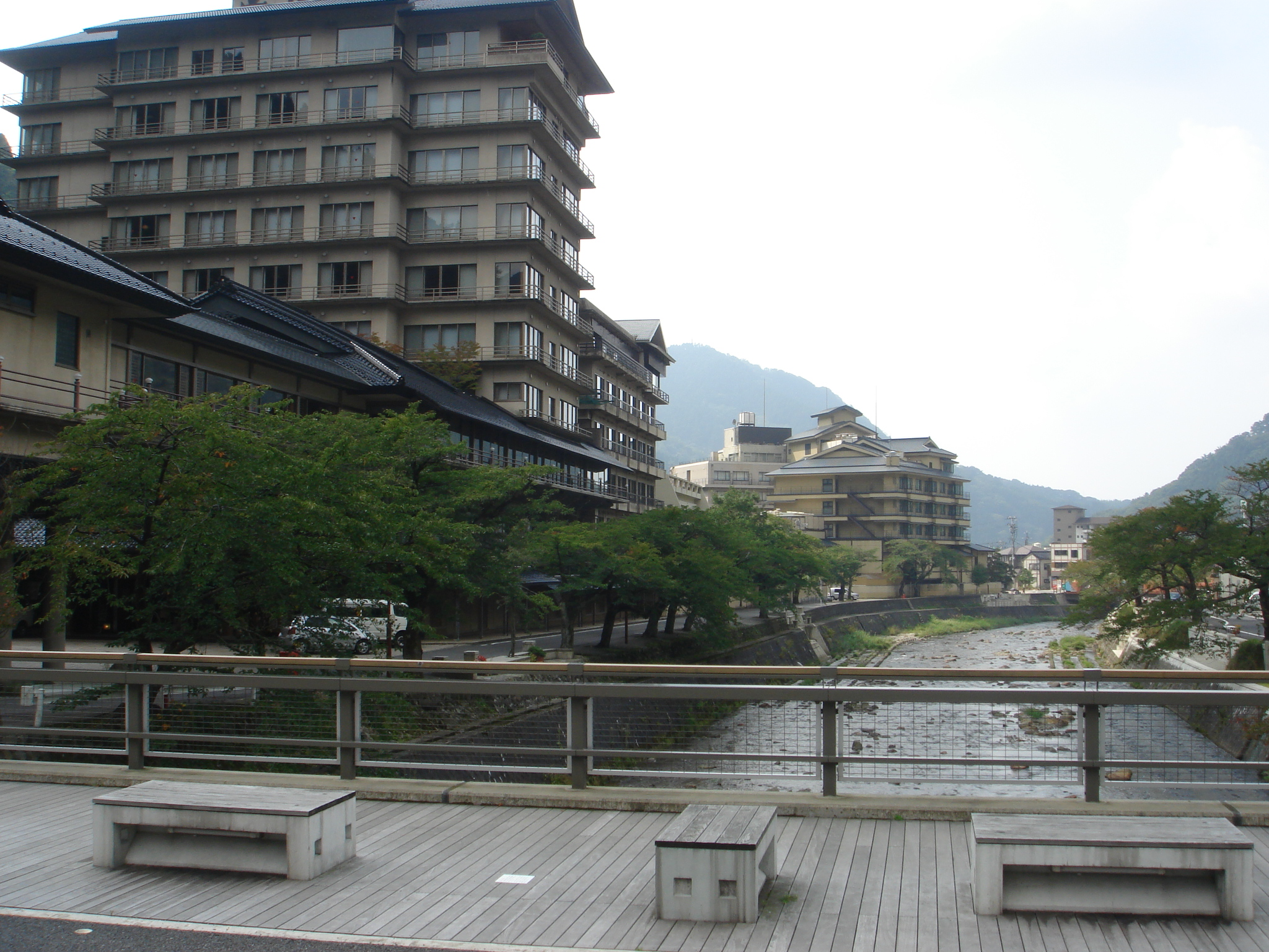 あつみ温泉「温海川」